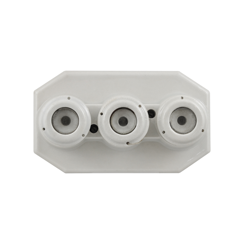 Gniazdo bezpiecznikowe porcelanowe, 1975 rok. Ówczesna nazwa producenta: PZPE Kontakt.